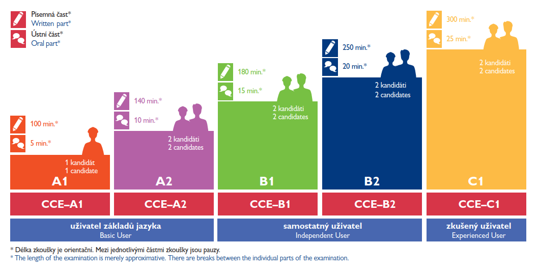 Úrovně jazykové komptence dle SERRJ a časový harmonogram CCE